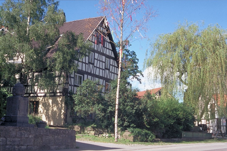 Brunnenhof in Mäusdorf